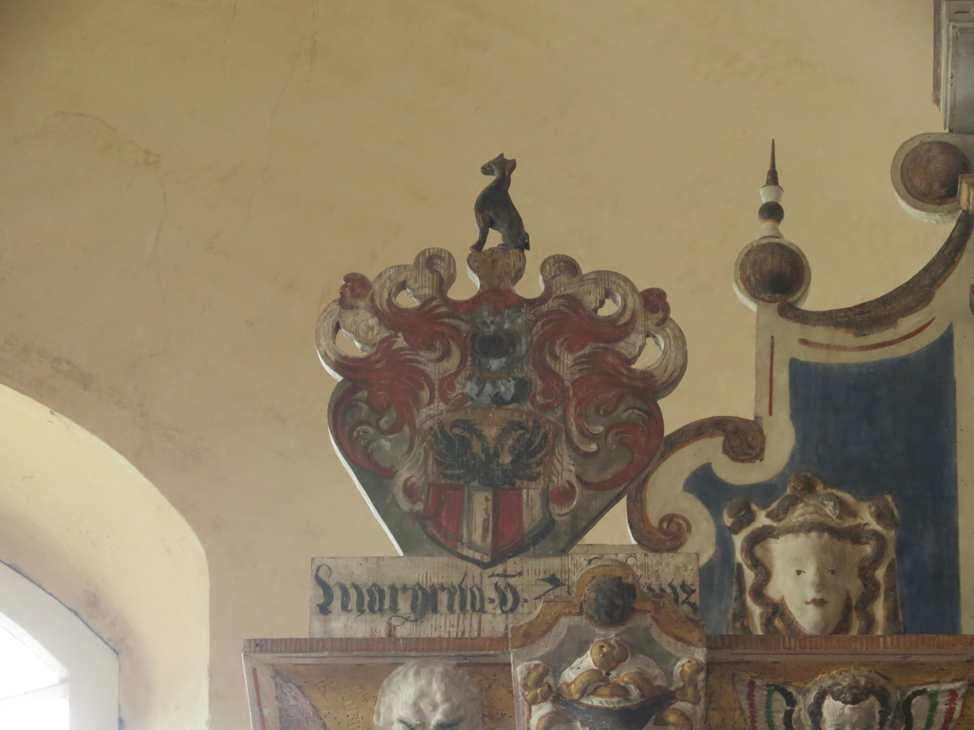 Dorfkirche Laubst, Ortsteil Laubst, Stadt Drebkau, Landkreis Spree-Neiße, Brandenburg, Innenraum, Innenraum, Wappen der Margarethe von Zabeltitz auf dem Altar